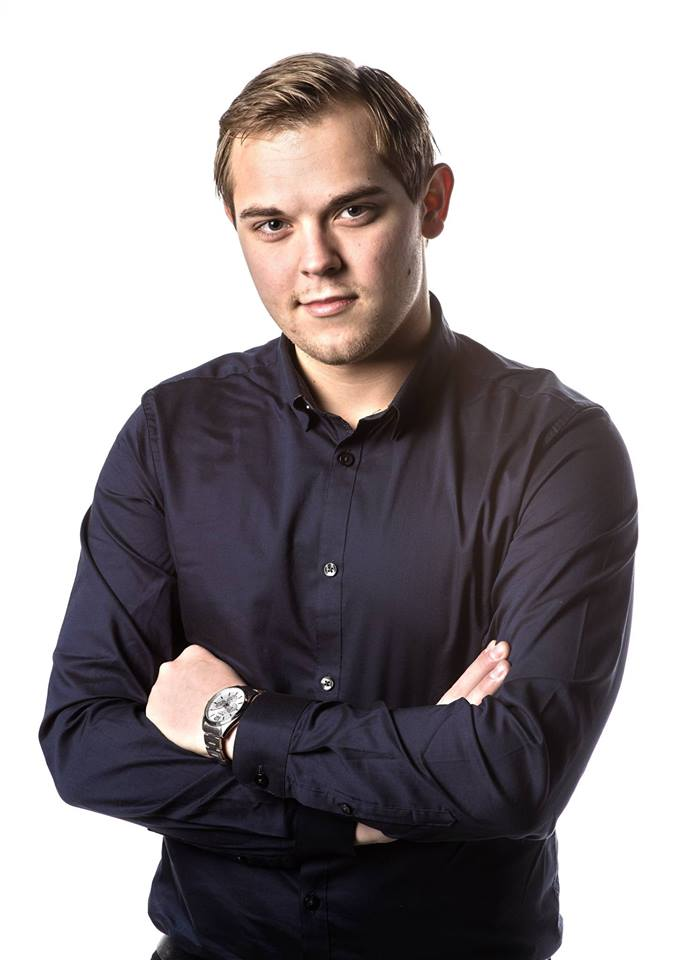 Ungdomspolitiker Carl Andersen, 2015